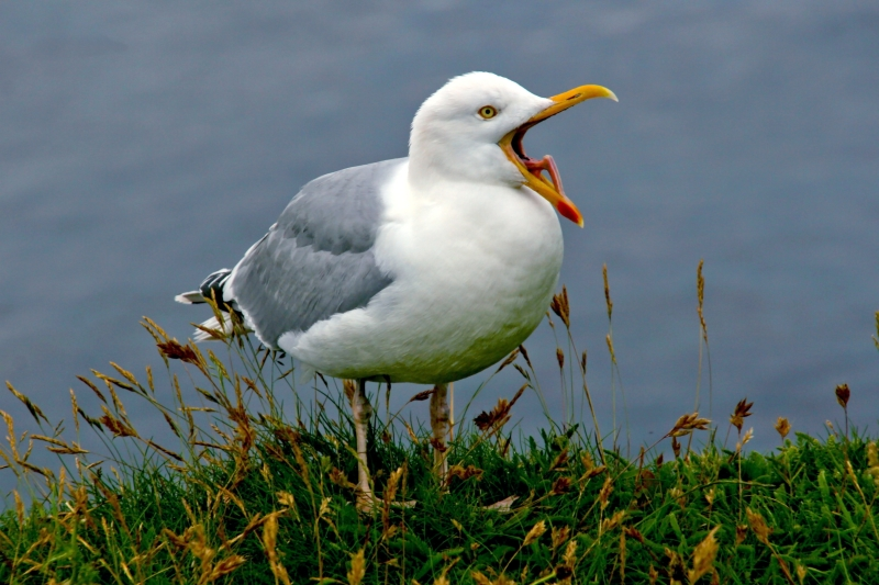 Silbermöwe, die Zunge wird zum Formen des Schreis abgeknickt